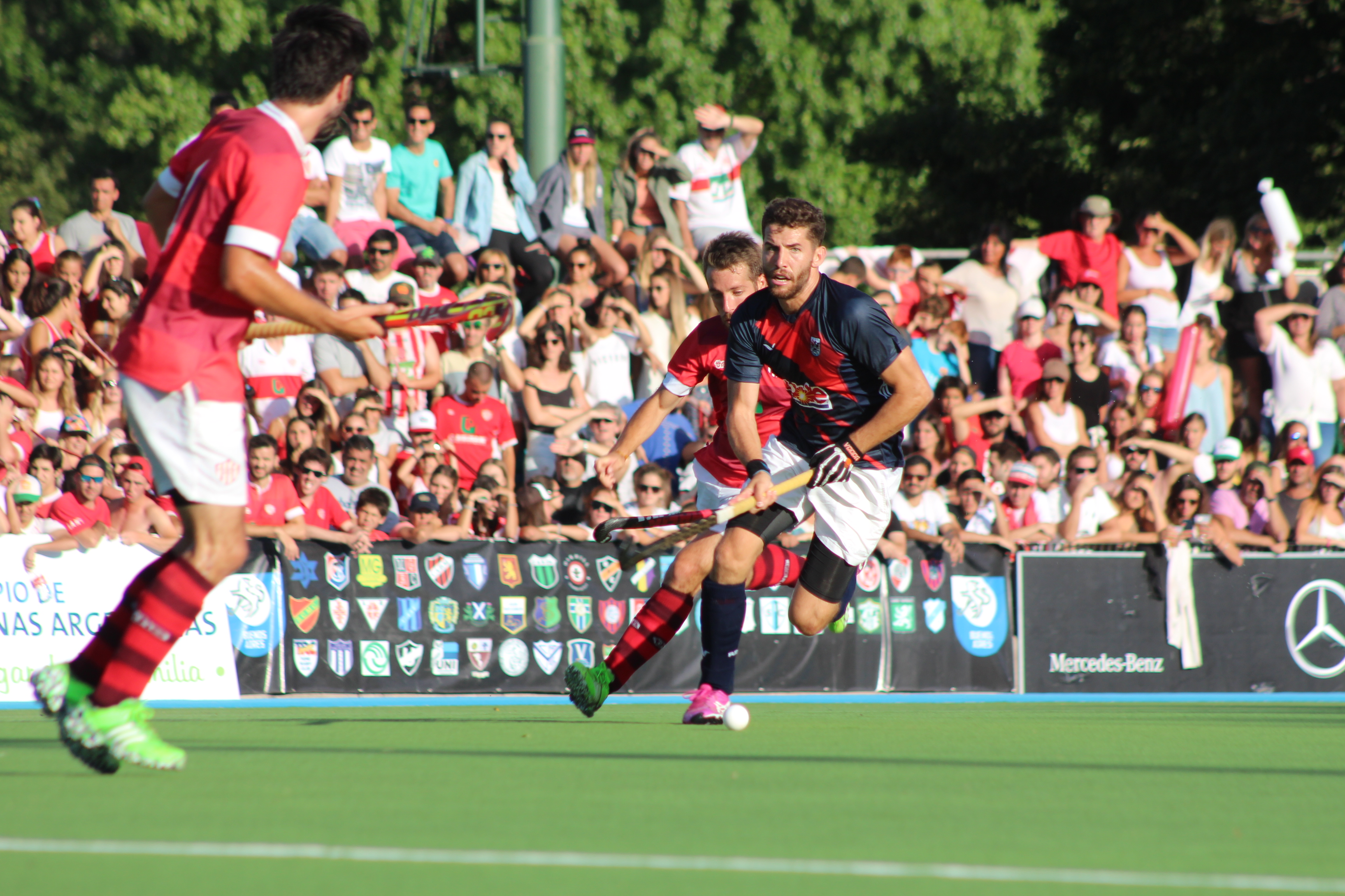 Nicolas Dela Torre